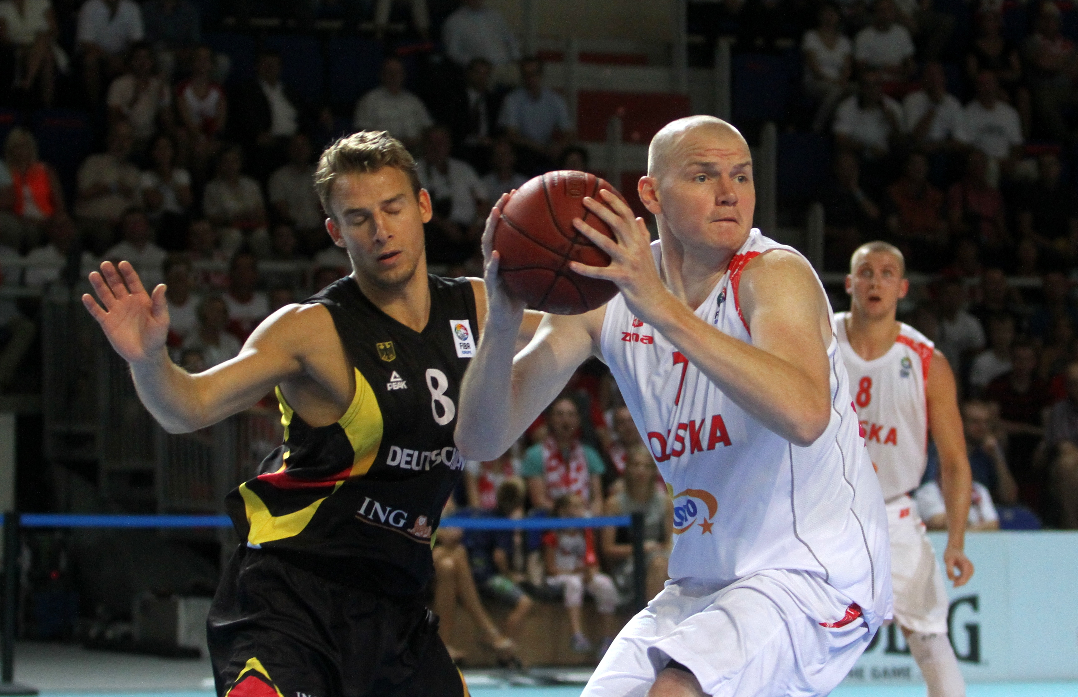 Eliminacje do EuroBasketu 2015: Polska Niemcy, Toruń, 10 sierpnia 2014. Damian Kulig